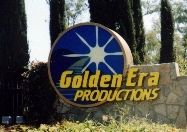 Golden Era Productions entrance sign